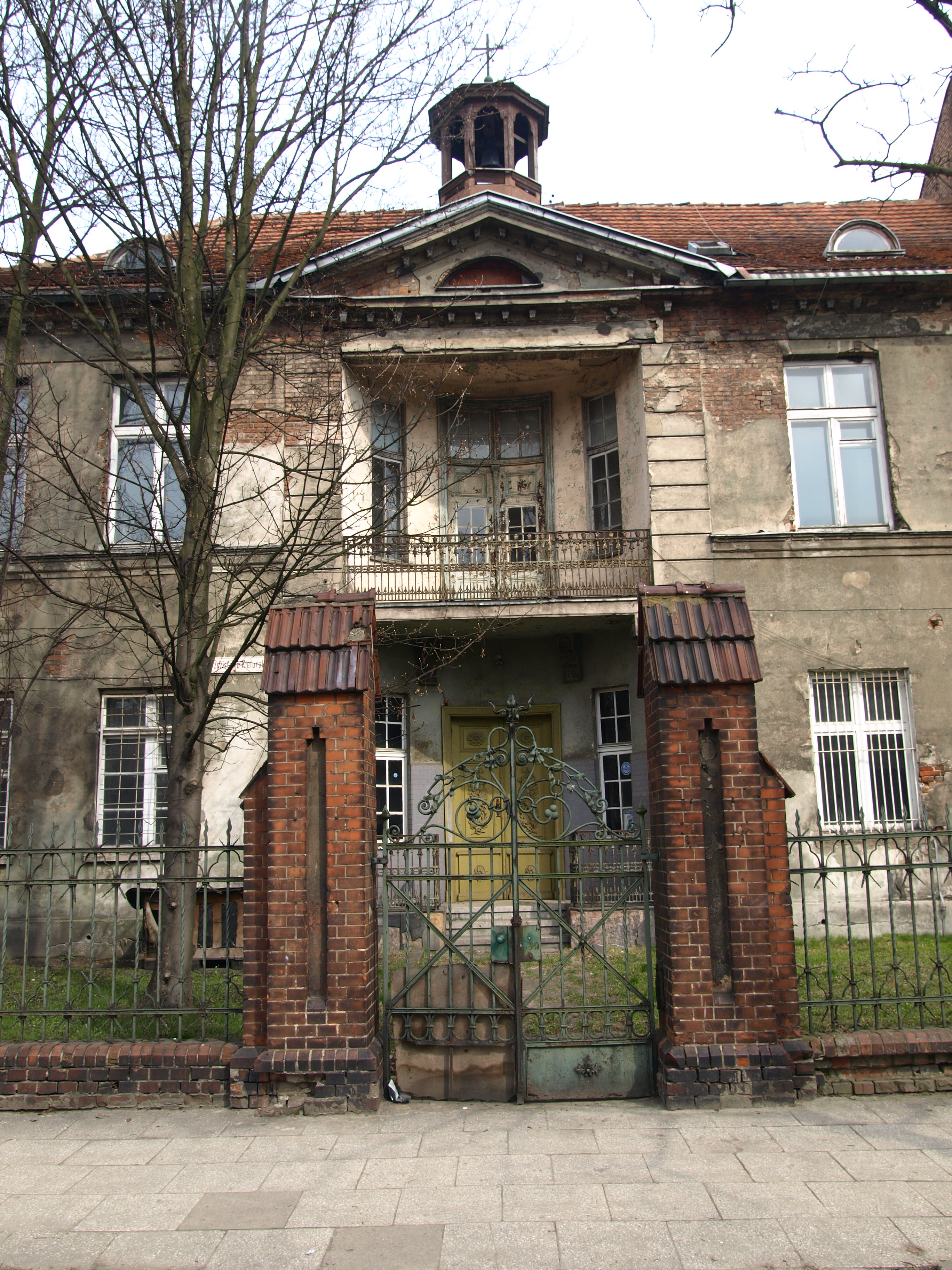 Gdańsk Dolne Miasto, ul. Kieturakisa 1 - dwór Uphagena, przejściowo szpital, 1800